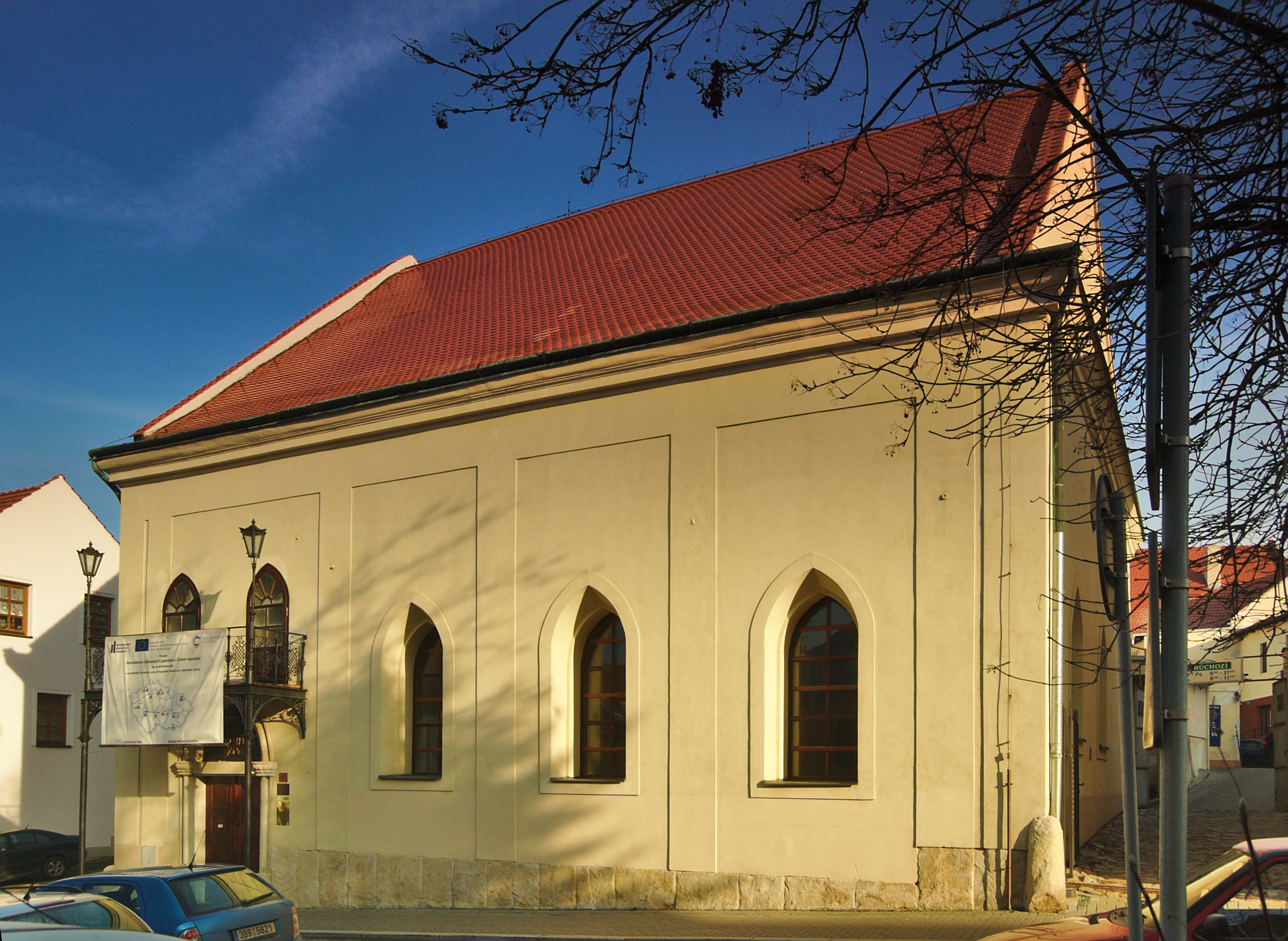 Synagoga maior, Boskovice, okres Blansko